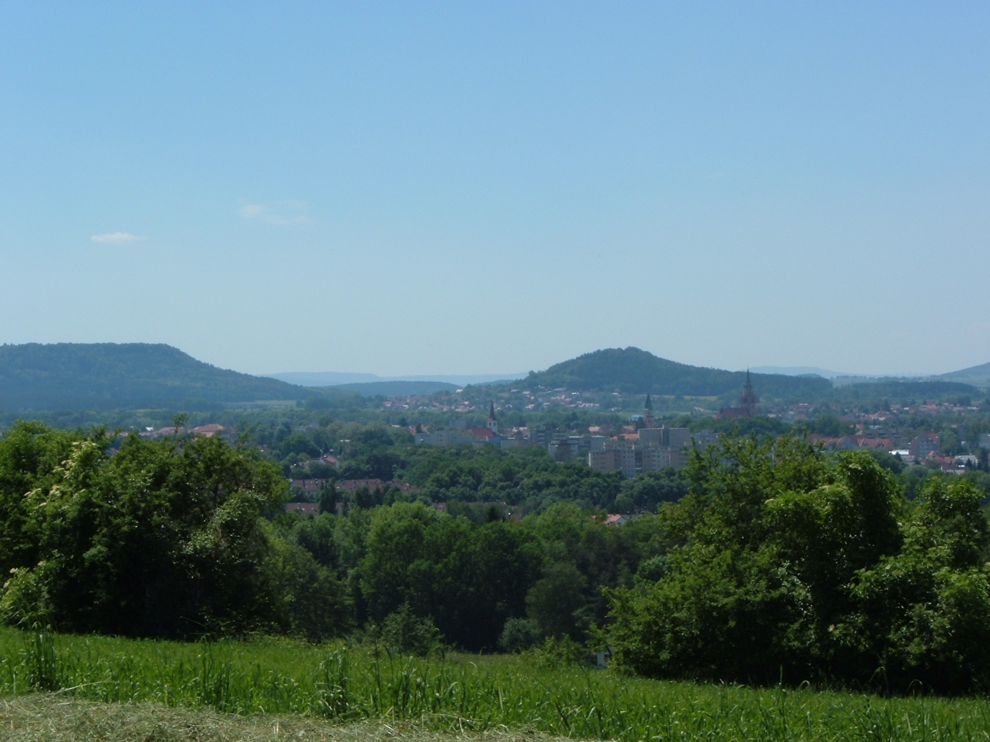 Blick auf Neumarkt, im Hintergrund Buchberg und Staufer Berg